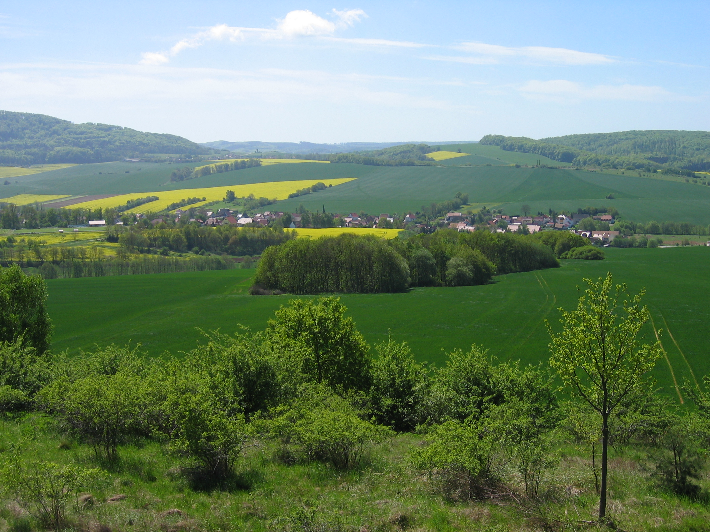 Blick nach Süden auf Ecklingerode und Umland vom ehemaligen Grenzübersichtspunkt Rote Warte. Links beginnt das Ohmgebirge (Trogberg), rechts befindet sich der Lindenberg. Im Vordergrund ist ein Teil des ehemaligen „Todesstreifens“ (Naturschutzgebiet „Grenzstreifen zwischen Teistungen und Ecklingerode“) sichtbar.